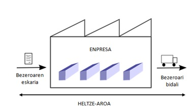 Heltze-aroaren faseak